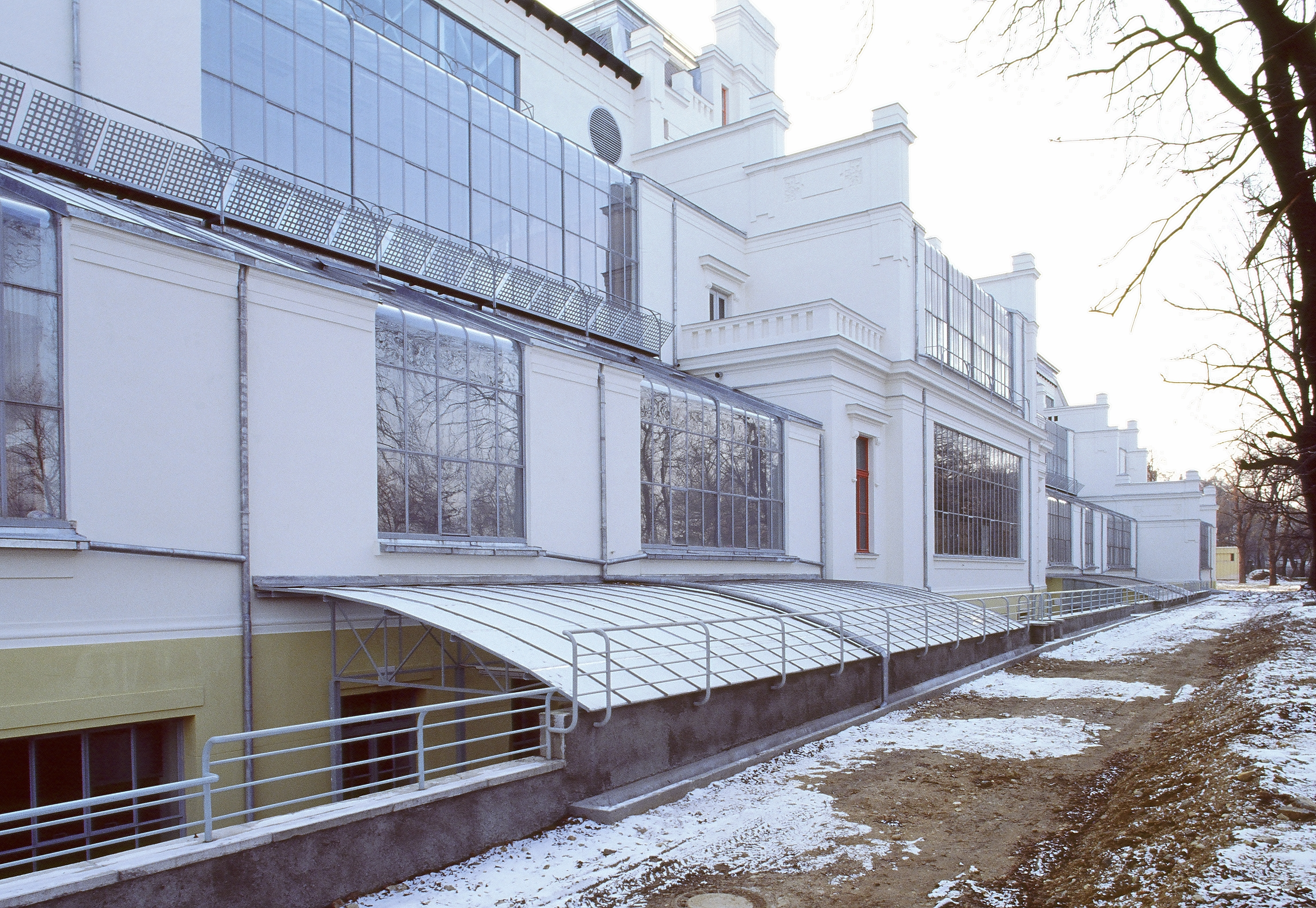 Pohled na ateliéry AVU z jižní strany